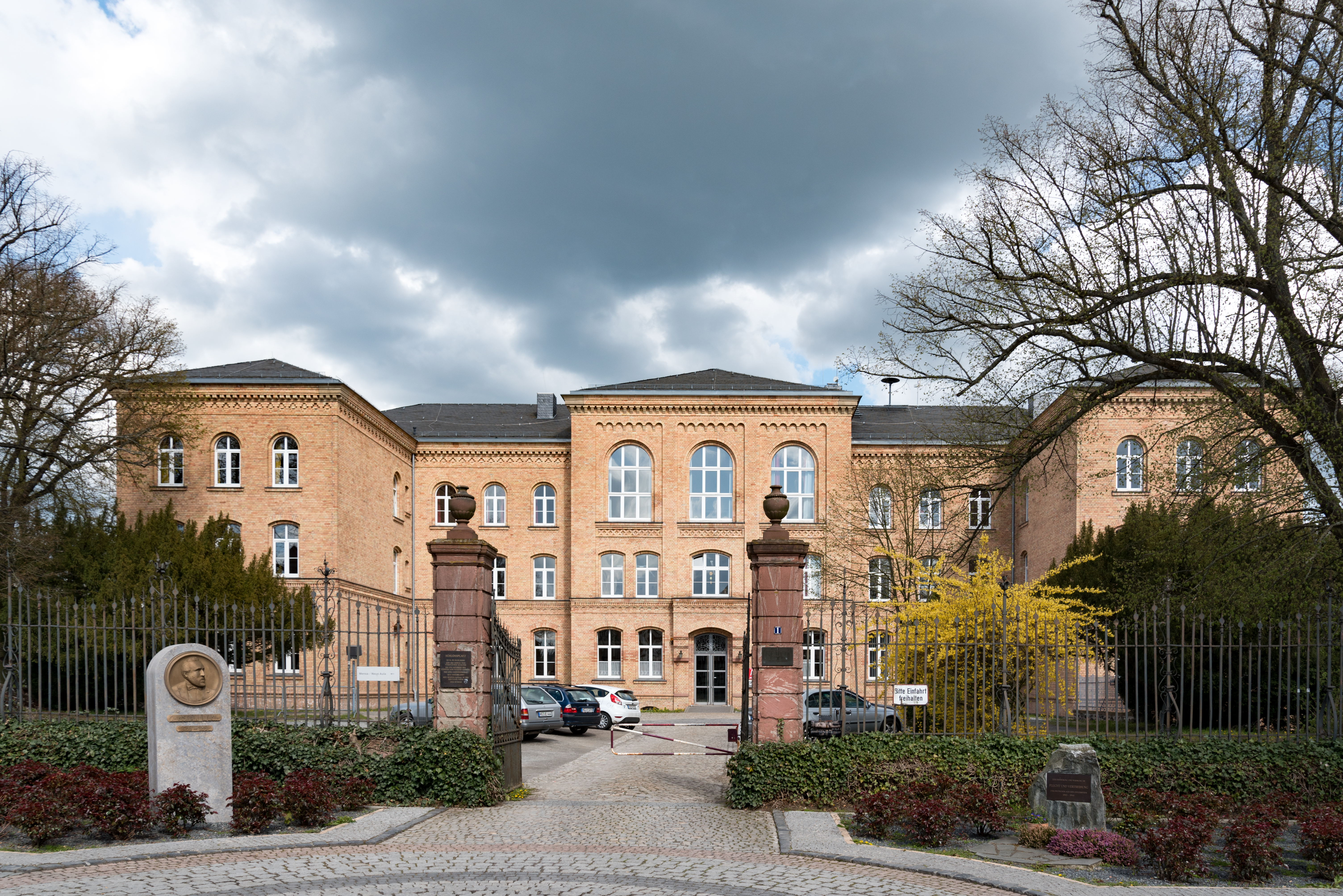 Usingen, Schloßplatz 1